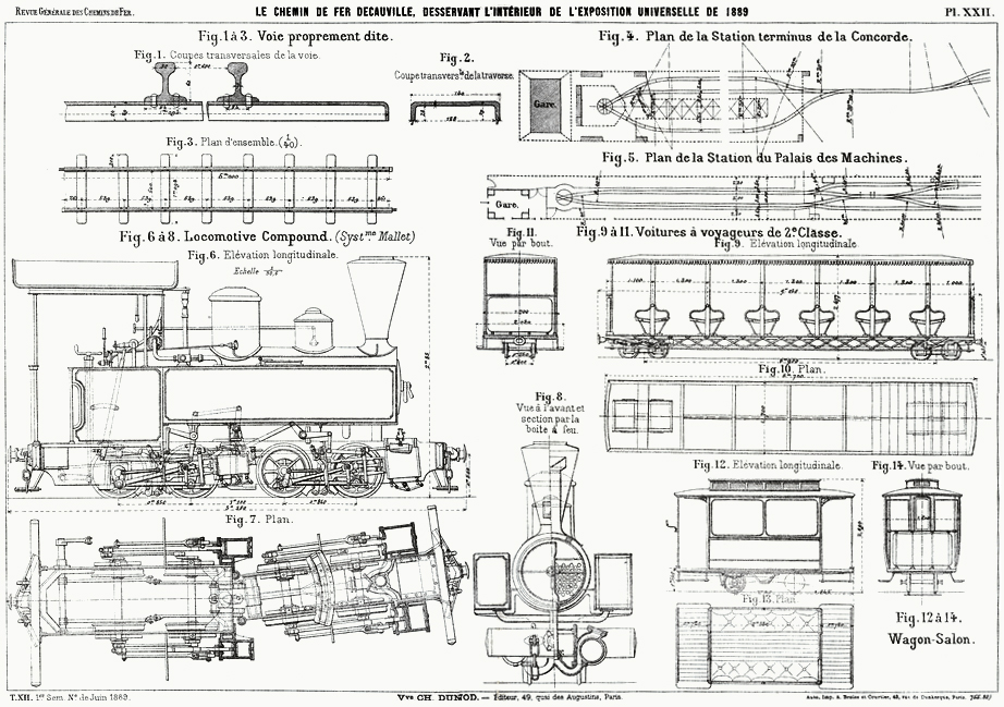 Exposition Universelle (1889) Decauville railway